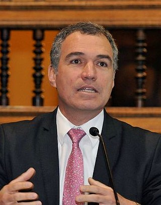 Salvador del Solar, político peruano